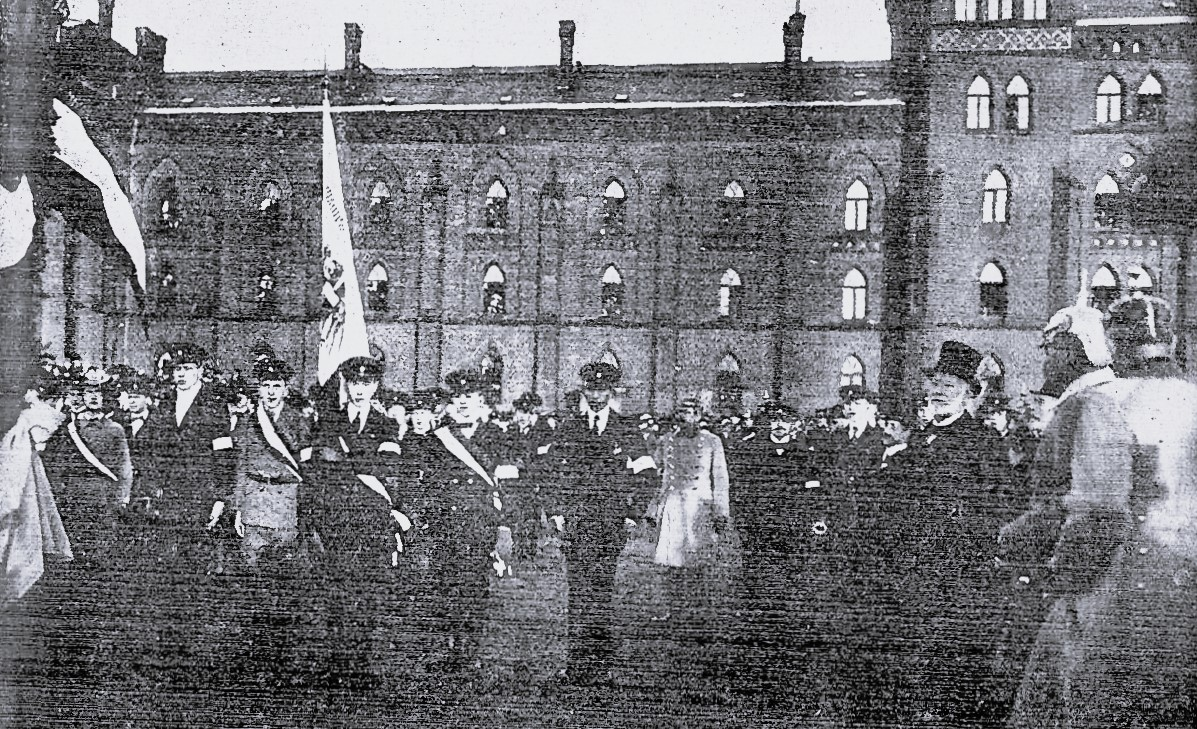 Die Fahnensektion der Jugendwehrkompanie mit der neu enthüllten Fahne auf der Fahnenweihe der Jugendwehr auf dem Hof der Alten Kaserne.